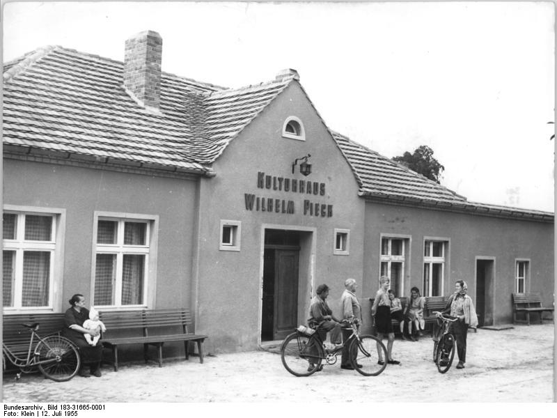 Hohendorf, Blick auf das Kulturhaus Zentralbild Klein Me-Th 12.7.55 Die Gemeinde Hohendorf hat ein Kulturhaus. Im Jahre 1952 erhielt die Gemeinde Hohendorf, Kreis Luckau, eine Prämie von 2.800 DM für vorfristige Ablieferung. Die werktätigen Bauern des Ortes beschlossen, mit diesem Geld ein Kulturhaus zu errichten. Unsere Regierung unterstützte den Bau durch weitere finanzielle Mitteil und Präsident Pieck spendete dem Dorf eine Bibliothek. Heute ist das Kulturhaus, das den Namen unseres Präsidenten Wilhelm Pieck trägt, Mittelpunkt des kulturellen Lebens in Hohendorf und den umliegenden Gemeinden. UBz: Aussenansicht des Kulturhauses "Wilhelm Pieck" in Hohendorf.